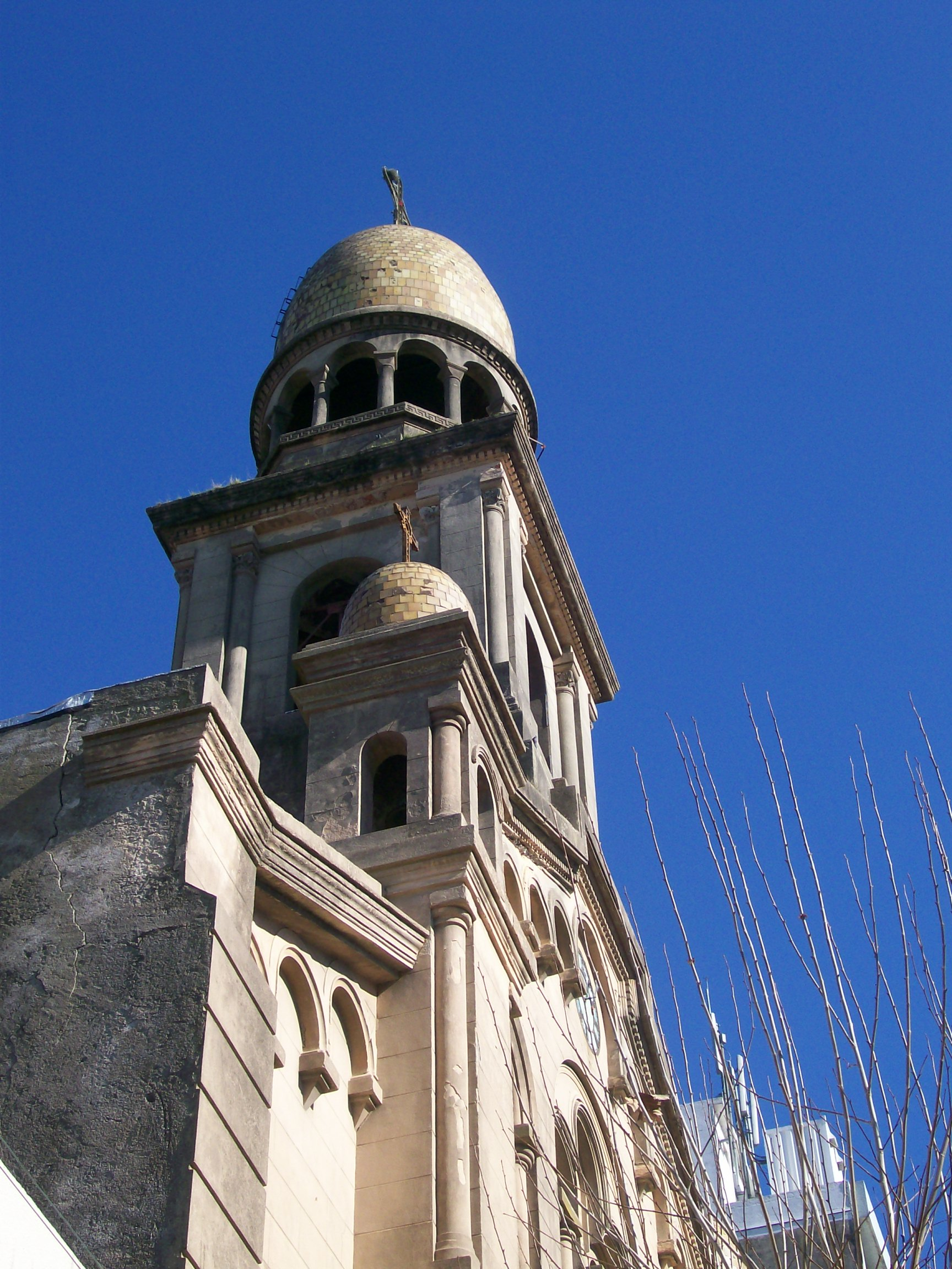 Iglesia San Pedro de Durazno. Ubicada en el departamento de Durazno